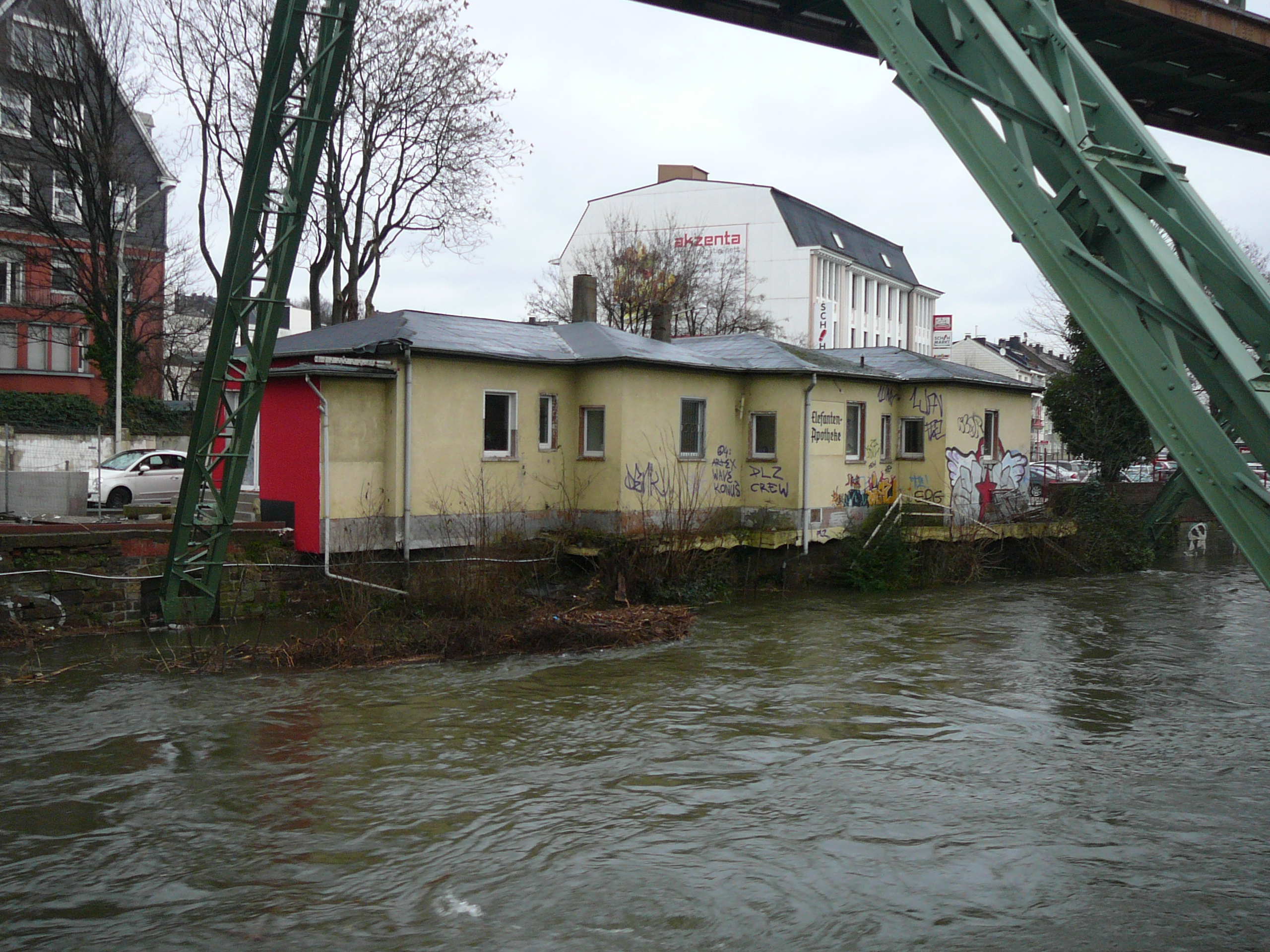 Friedrich-Engels-Allee, Wuppertal